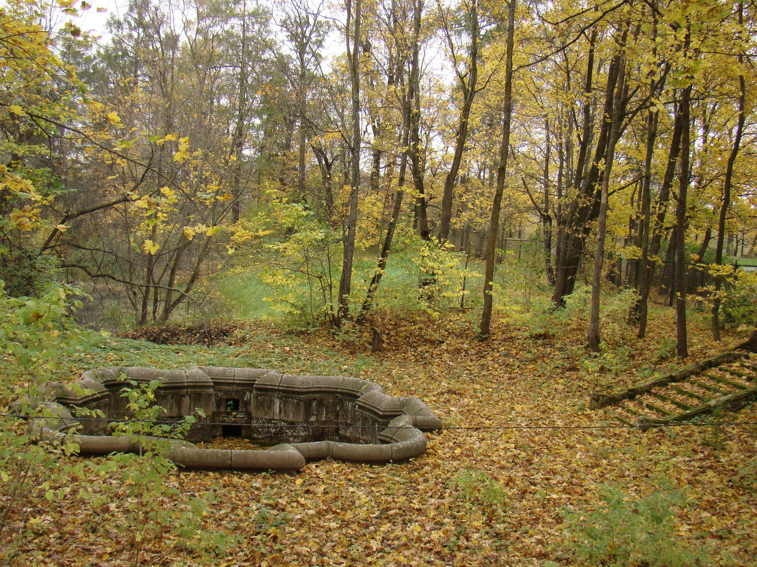 Колодец Восьмигранный: Дворцовый парк, Гатчина, Гатчинский район, Ленинградская область